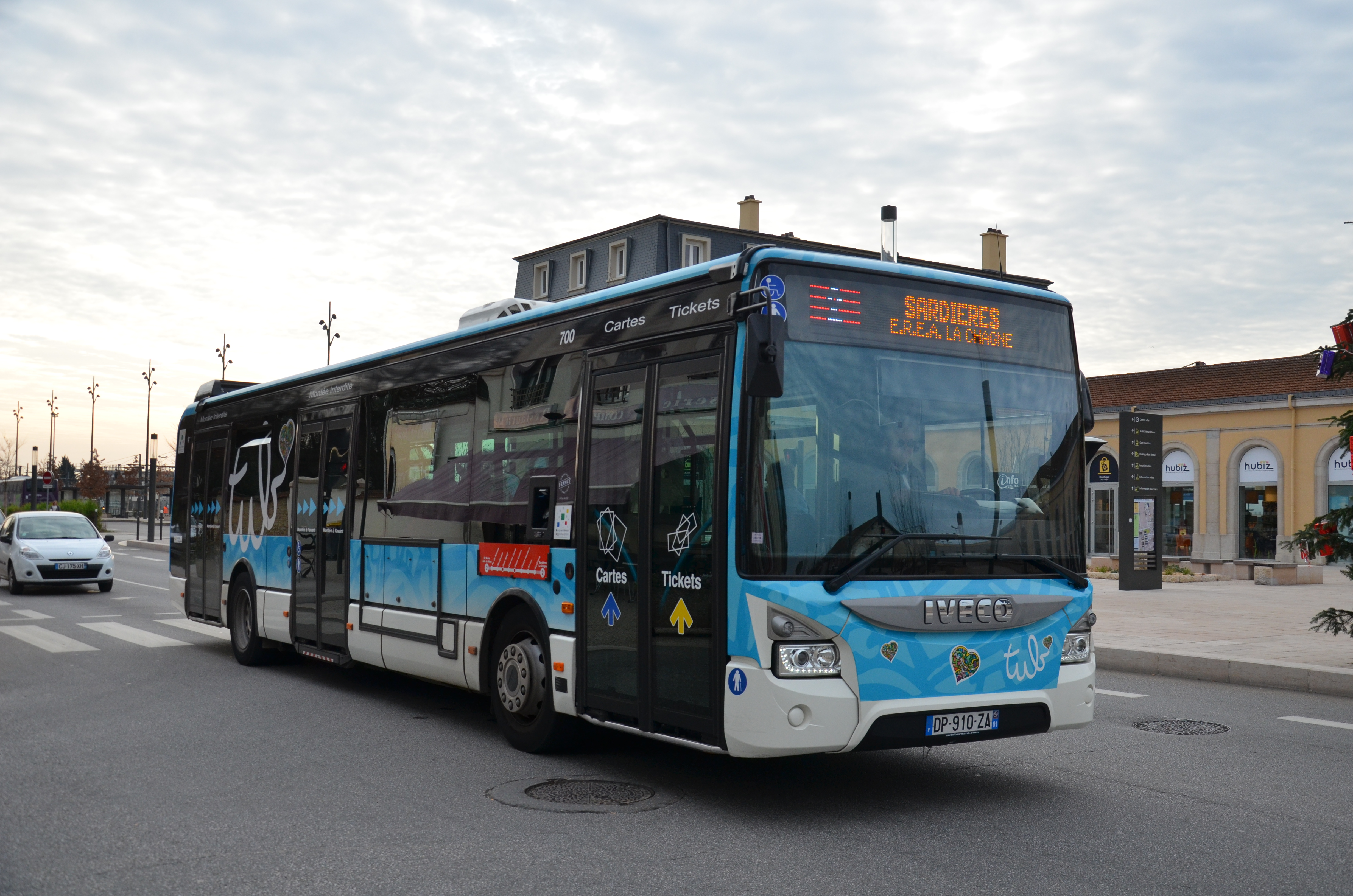 Iveco Bus Urbanway n°700 du réseau TUB de Bourg-en-Bresse, près de l'arrêt Sémard Gare.